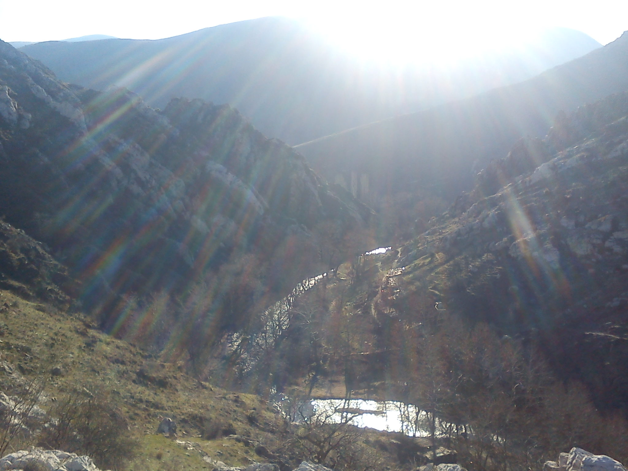 Реката Тополка погледната од Калето